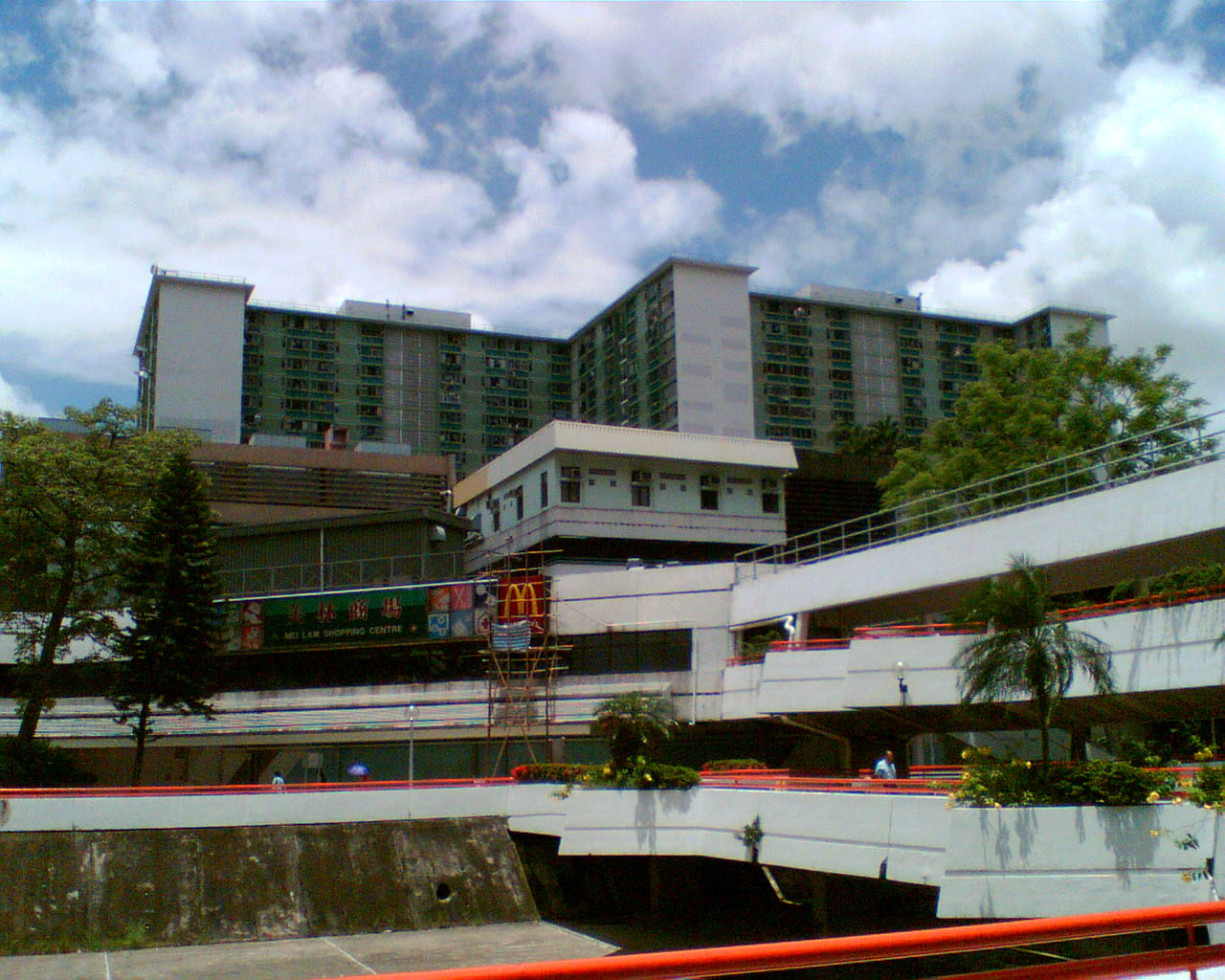 美林邨跨河天橋